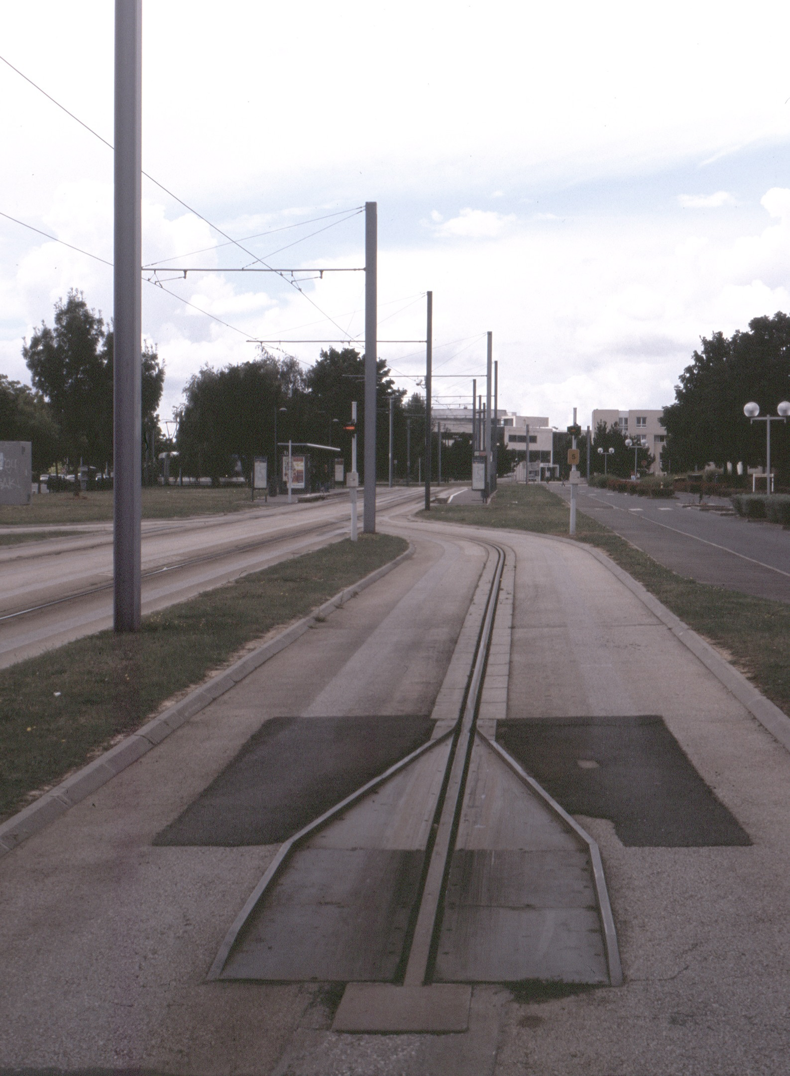 Einfädeltrichter des Oberleitungsbusses Caen